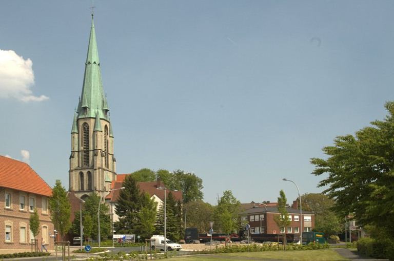 Der Kreisverkehr und die katholische Pfarrkirche St. Johannes Baptist in Altenberge.